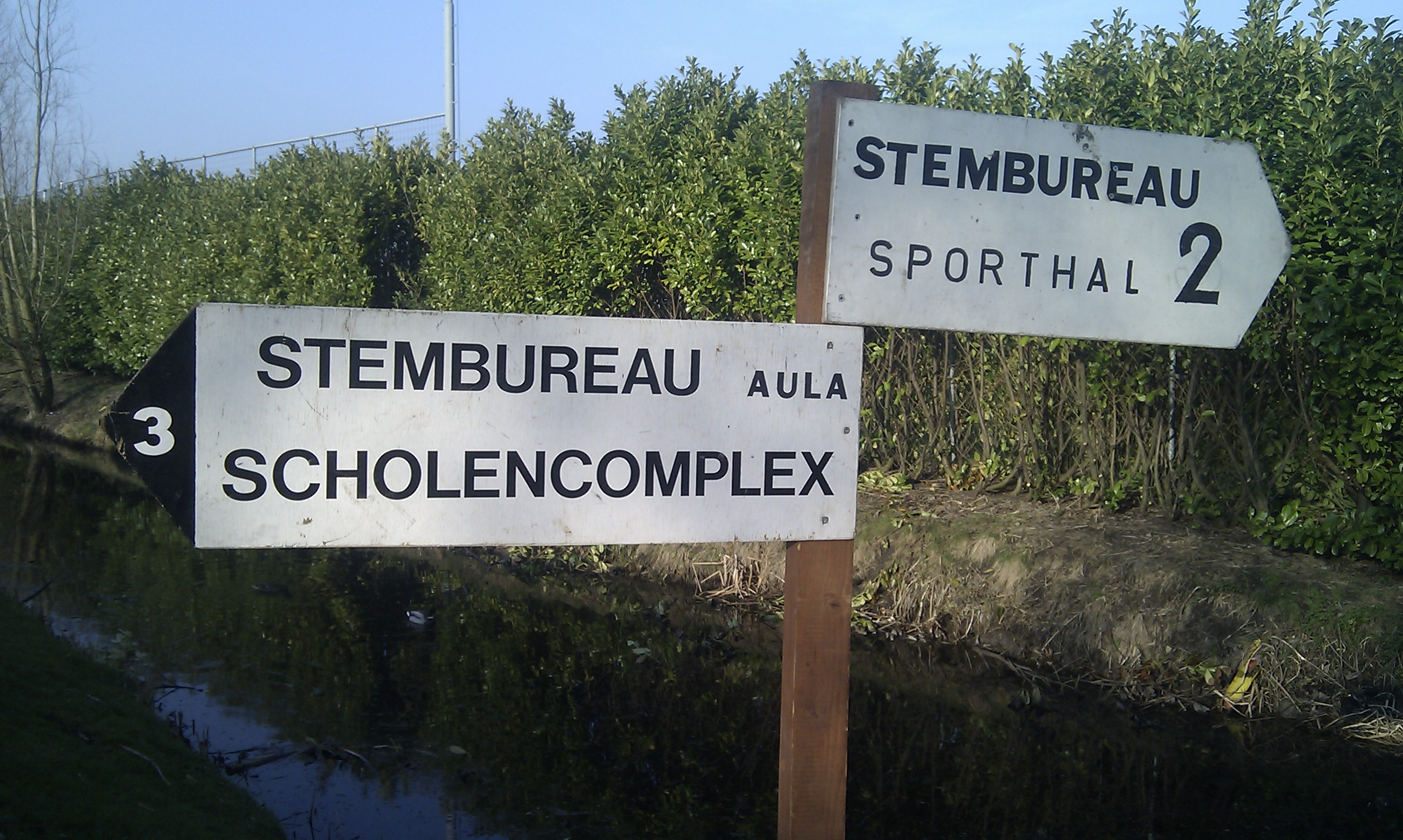 Stembureau in Montfoort tijdens de Provinciale Statenverkiezingen 2011.